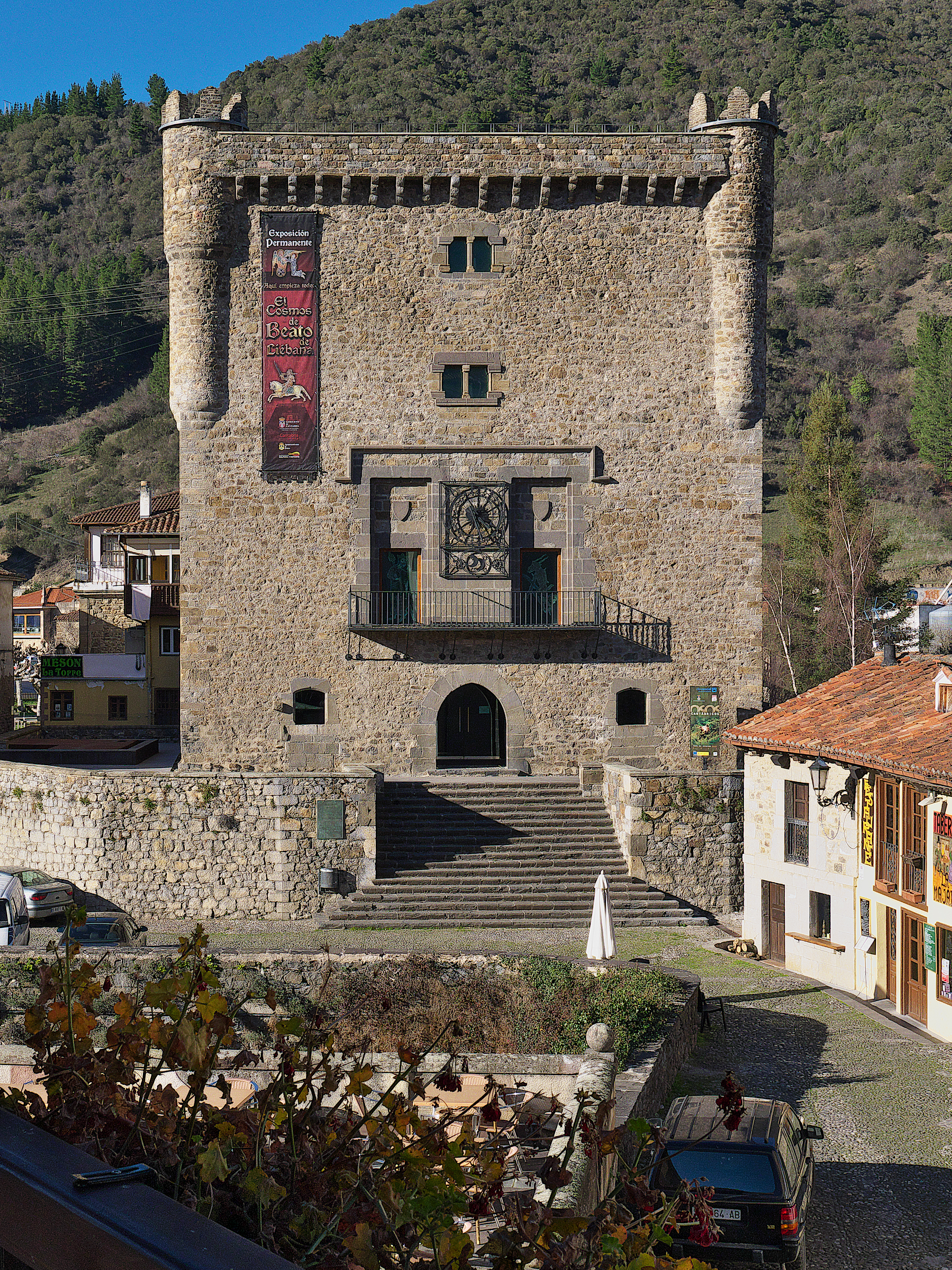 Tello de Castilla (1337-1370) construye la torre. Diego Hurtado de Mendoza recibe el Ducado del Infantado (1520) por los Reyes Católicos